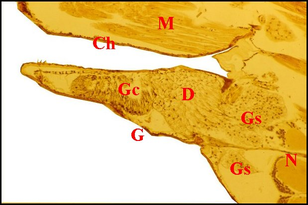 Coupe parasagittale du prosoma de Leptoneta microphtalma mâle montrant les glandes "salivaires" "classiques" et les glandes "sexuelles".